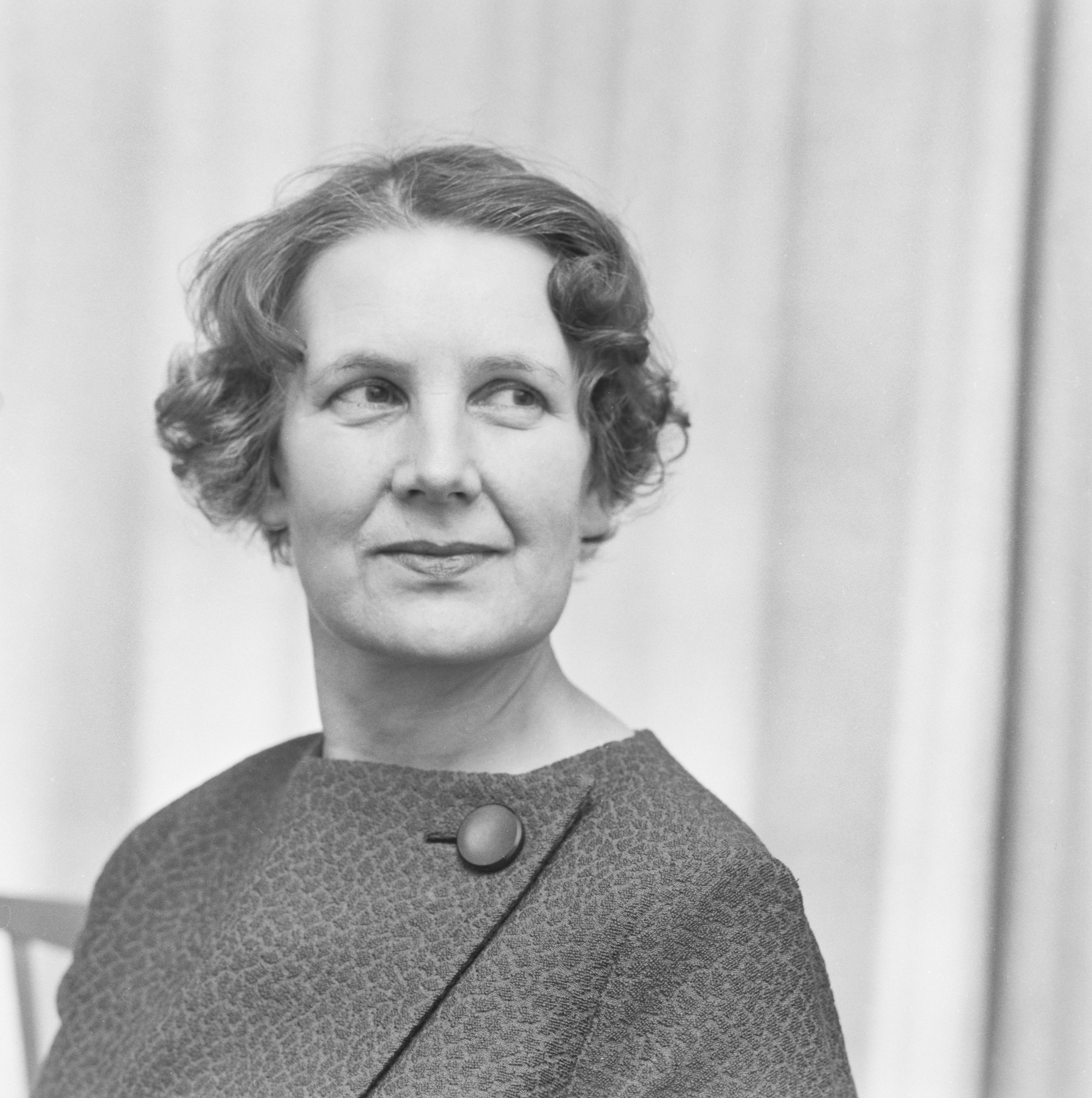 Kansallisen kokoomuksen kansanedustaja, varatuomari Aune Innala; mustavalkoinen